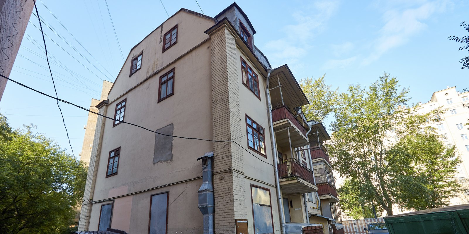 Жилой дом рабочего товарищества «Трудкоопстрой», памятник конструктивизма 1920-х, арх-р Вильгельм Циммер